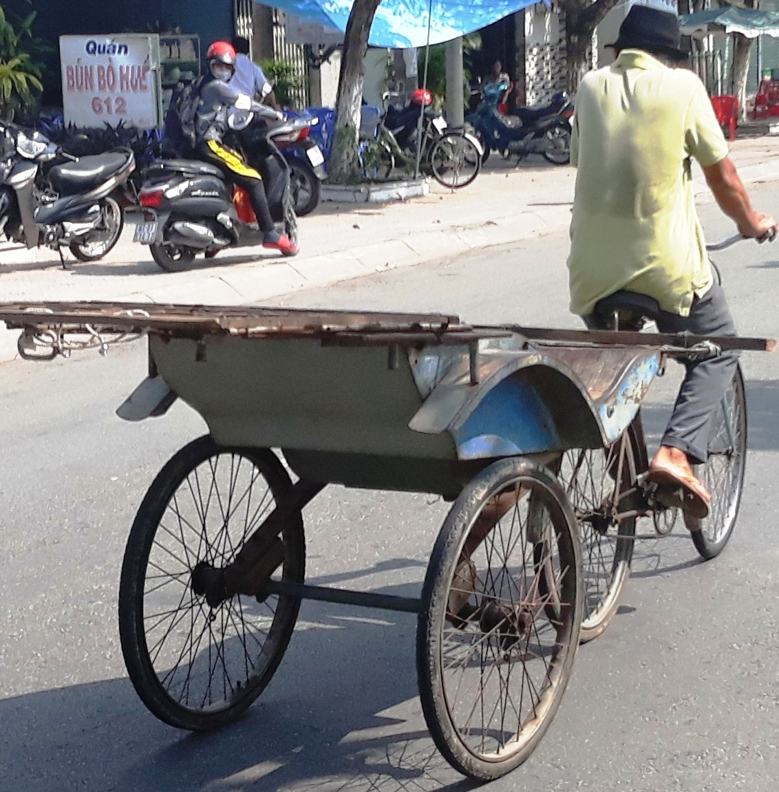 Xe Lôi